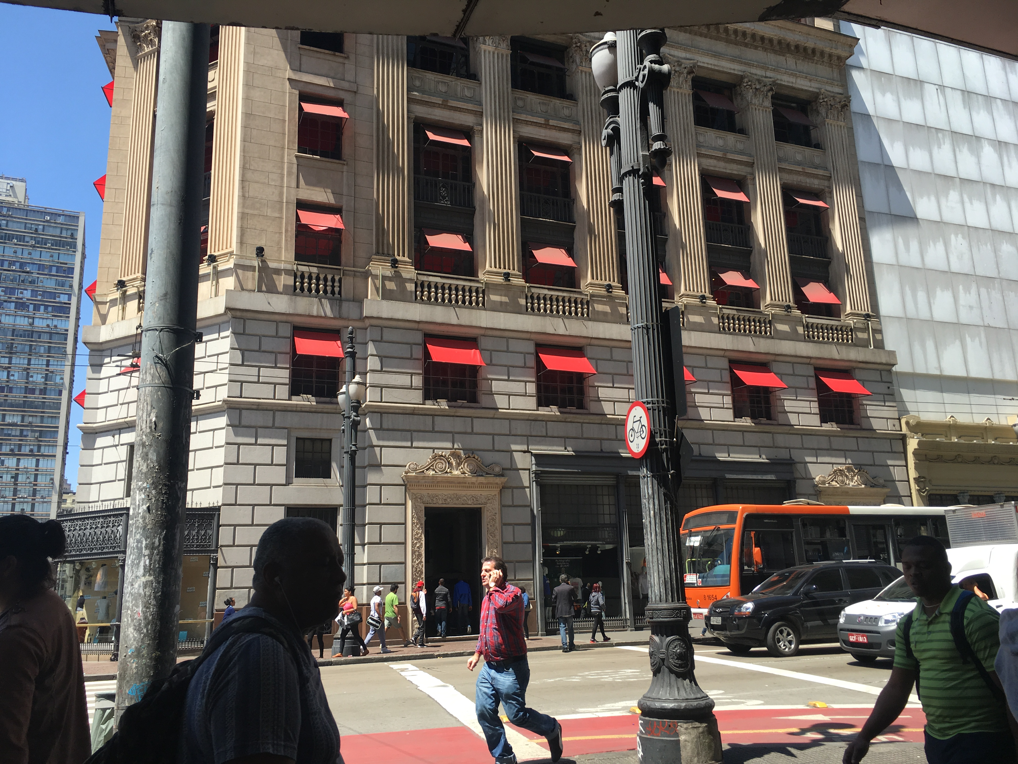 Fachada do Edifício Alexandre Mackenzie, a partir da Rua Coronel Xavier de Toledo, São Paulo (SP).